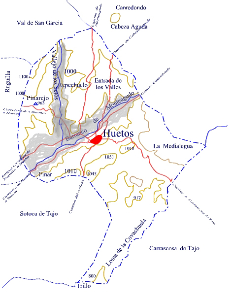 Mapa del término municiapl de huetos en 2002